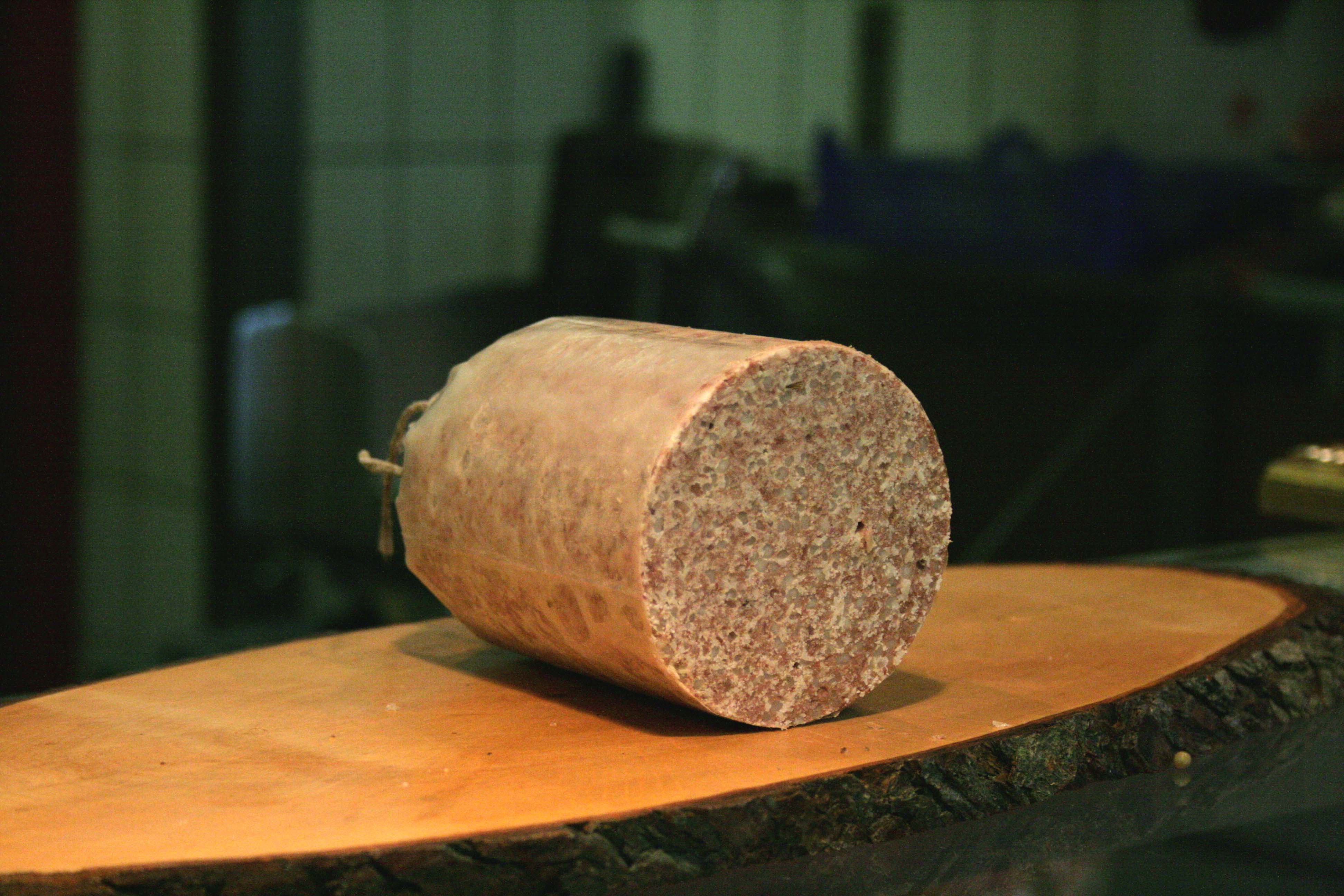 Wurstebrei (Metzgerei Klaus, Versmold) vorm Braten